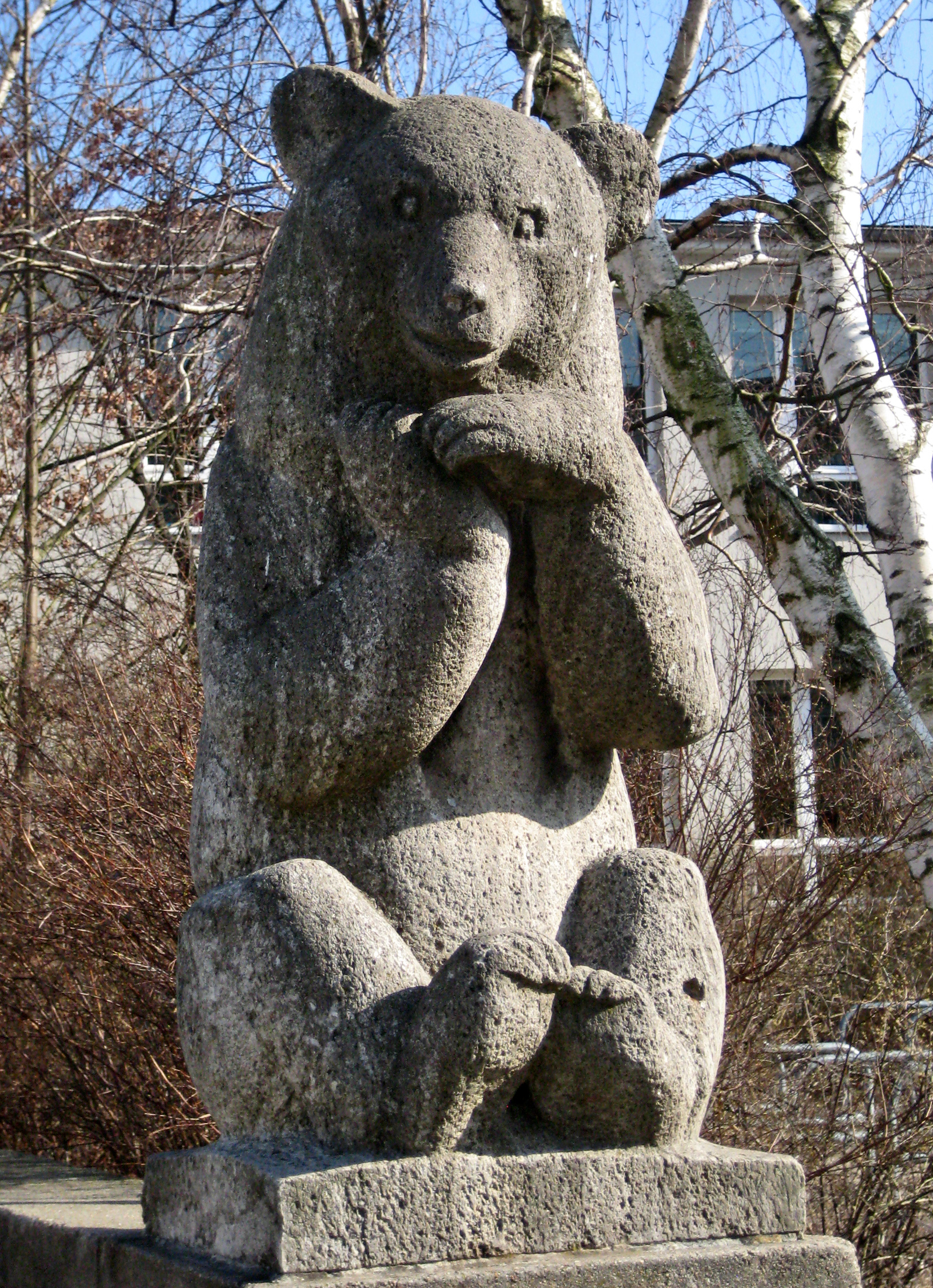 Junger Bär von Rose-Maria Stiller 1958 - Treppenaufgang zur Dietrich-Bonhoeffer-Schule, Meiningenallee 20/22 in Berlin-Westend